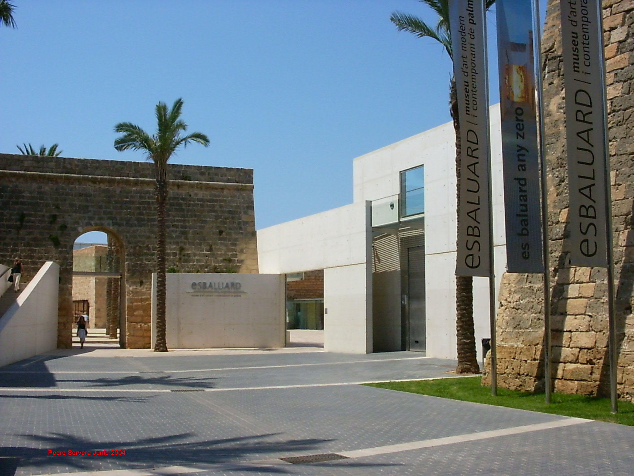 Entrada2-2